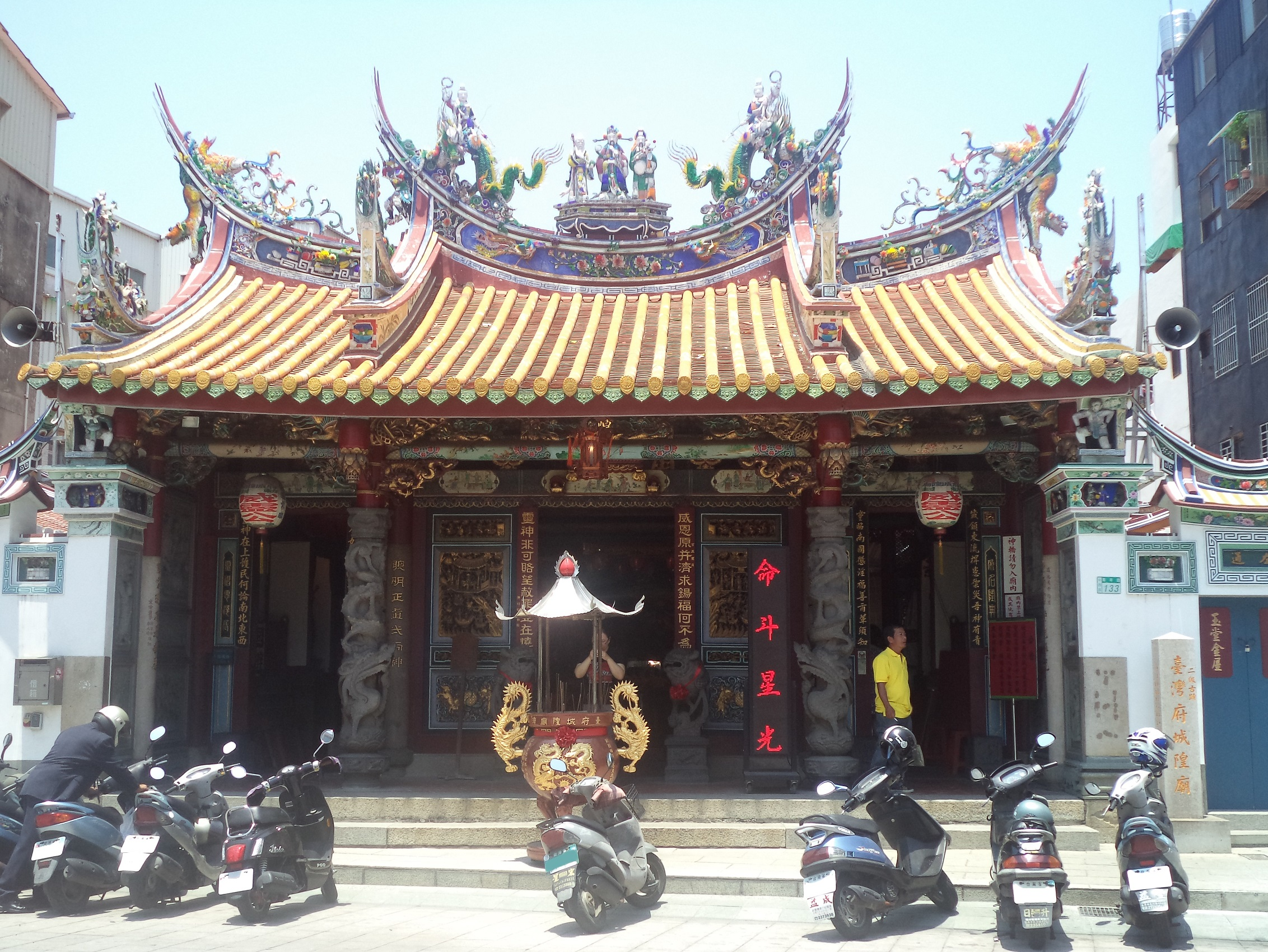 臺灣府城隍廟in臺南